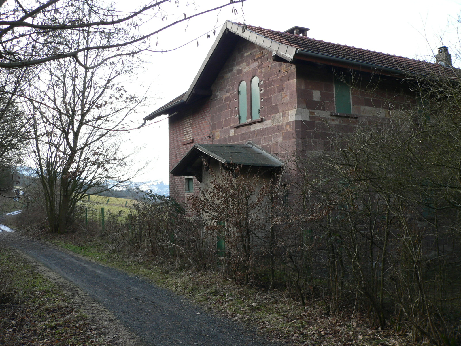 Ehemaliges Bahnwärterhaus der Carlsbahn zwischen Trendelburg und Wülmersen Fotograf: selbst fotografiert Datum: 12.02.2006